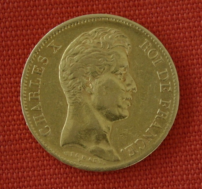 40 Francs Goldmünze aus 1830 mit Konterfei Karl X.